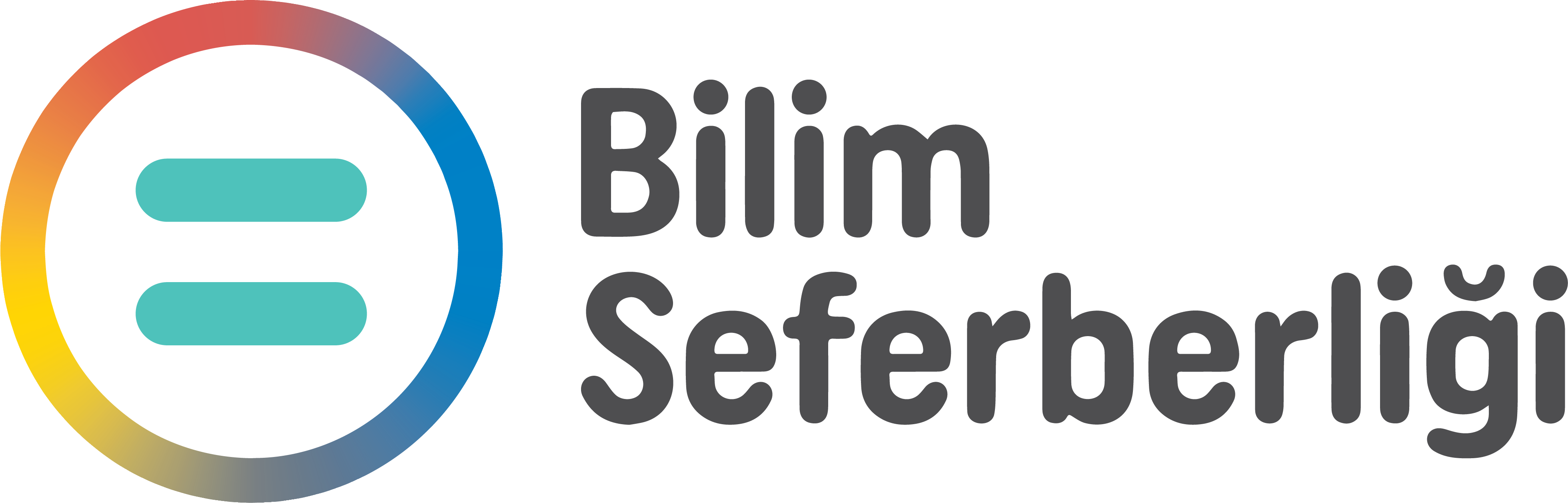 Bilim Seferberliği